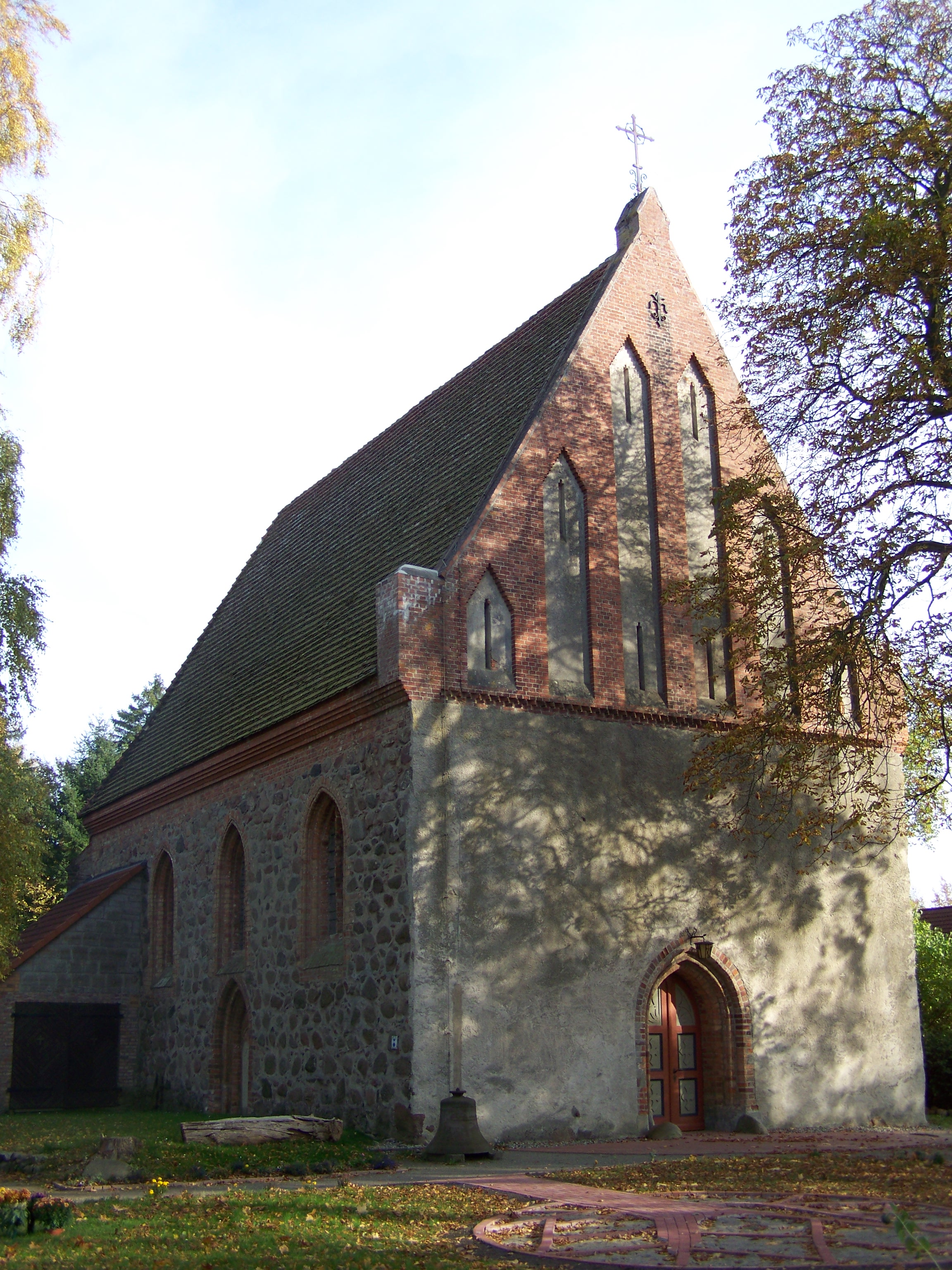 Züssow, Kirche (2009-10-22)